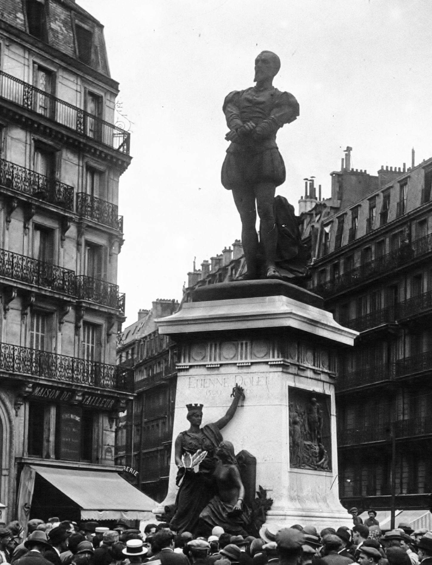 Statue de bronze d'Etienne Dolet par Ernest Guilbert, place Maubert. Inaugurée en 1889 elle est enlevée en 1942.